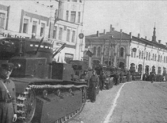 Парад военной техники в Орле в конце 1930-х